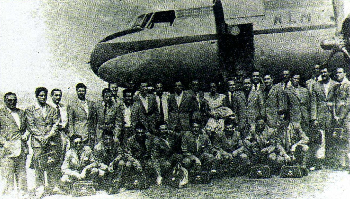 Club Atlético Tigre